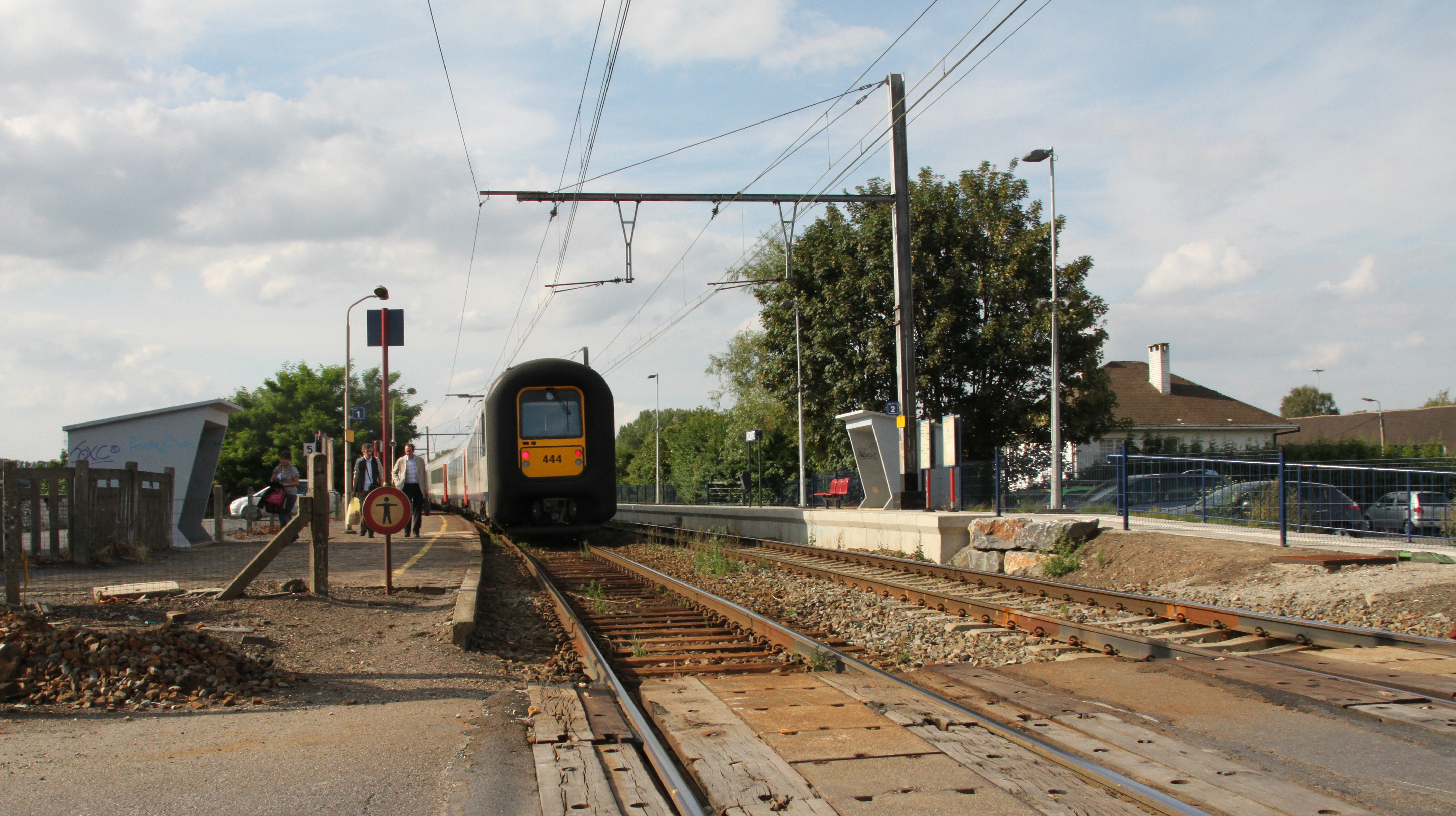 Station Milmort in augustus 2010.